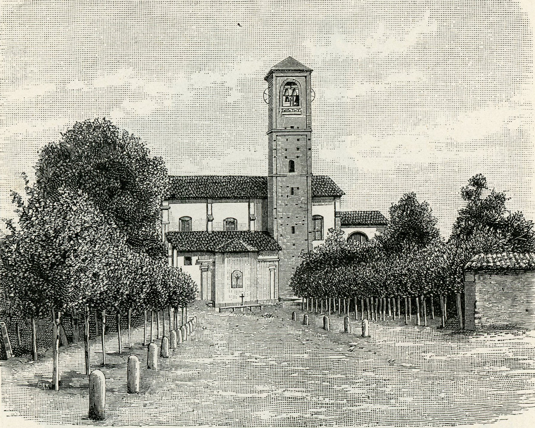 Magenta: chiesa prepositurale di San Martino (xilografia).